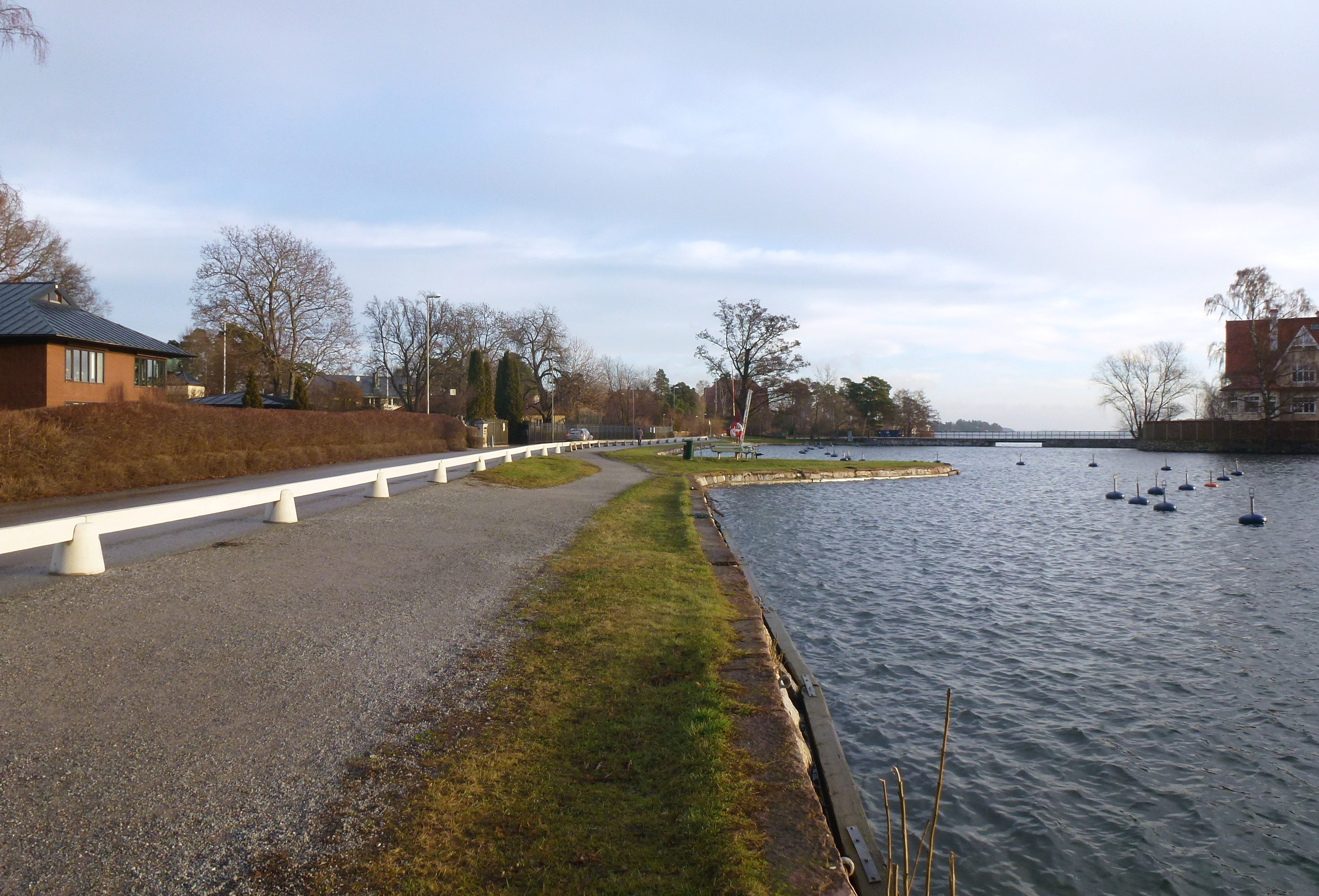 Strandvägen Djursholm, t.h. syns Vågaskär